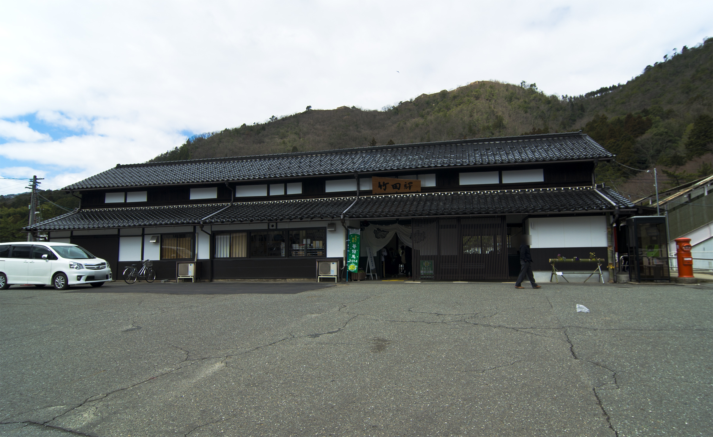 西日本旅客鉄道株式会社播但線竹田駅駅舎